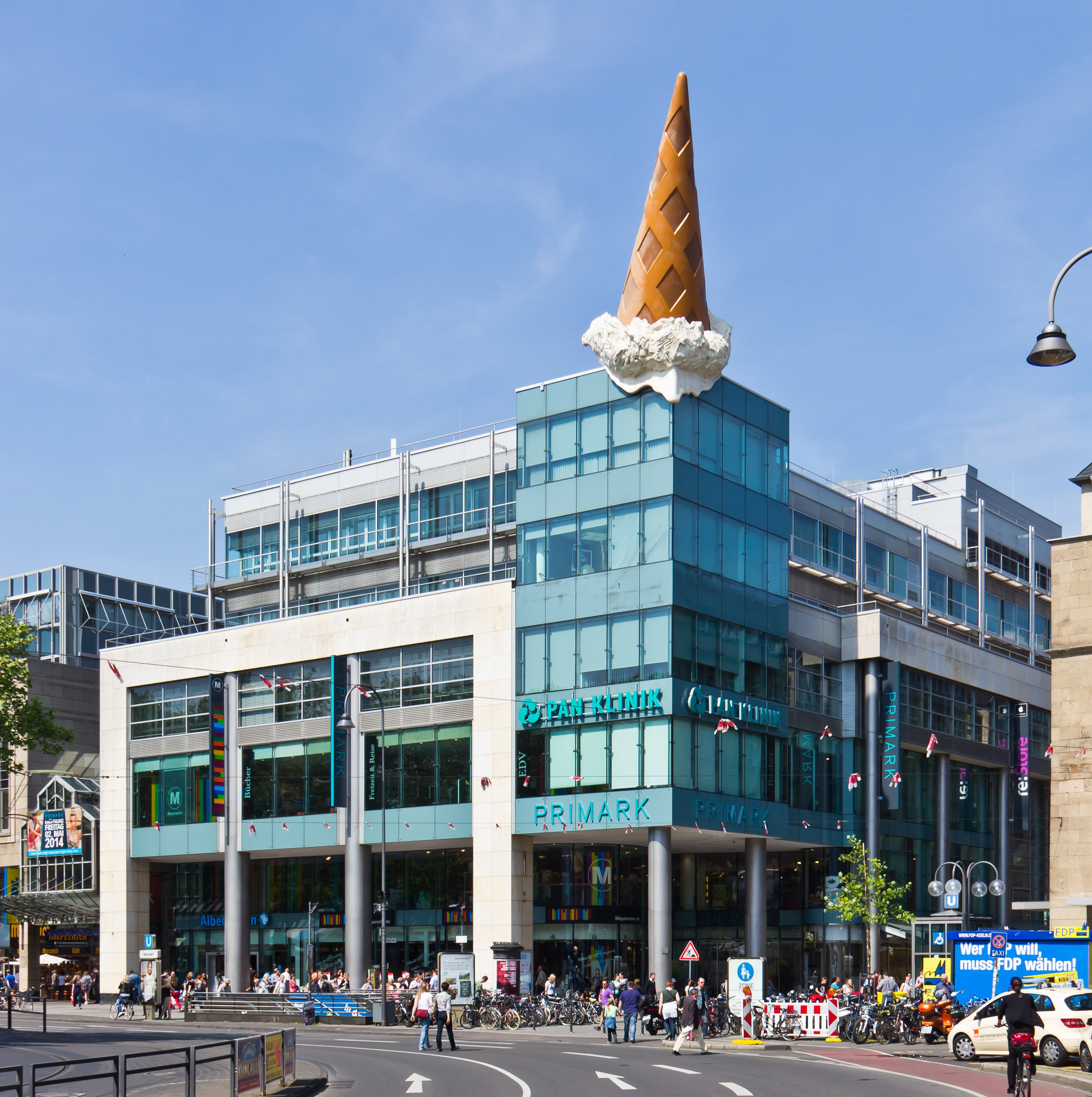 Neumarkt-Galerie, Köln mit der Skulptur einer auf den Kopf gestellten Eistüte („Dropped Cone“) von Claes Oldenburg und Coosje van Bruggen